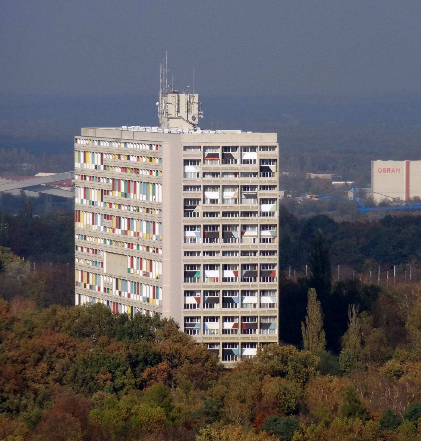 Corbusierhaus - vom Teufelsberg aus gesehen.